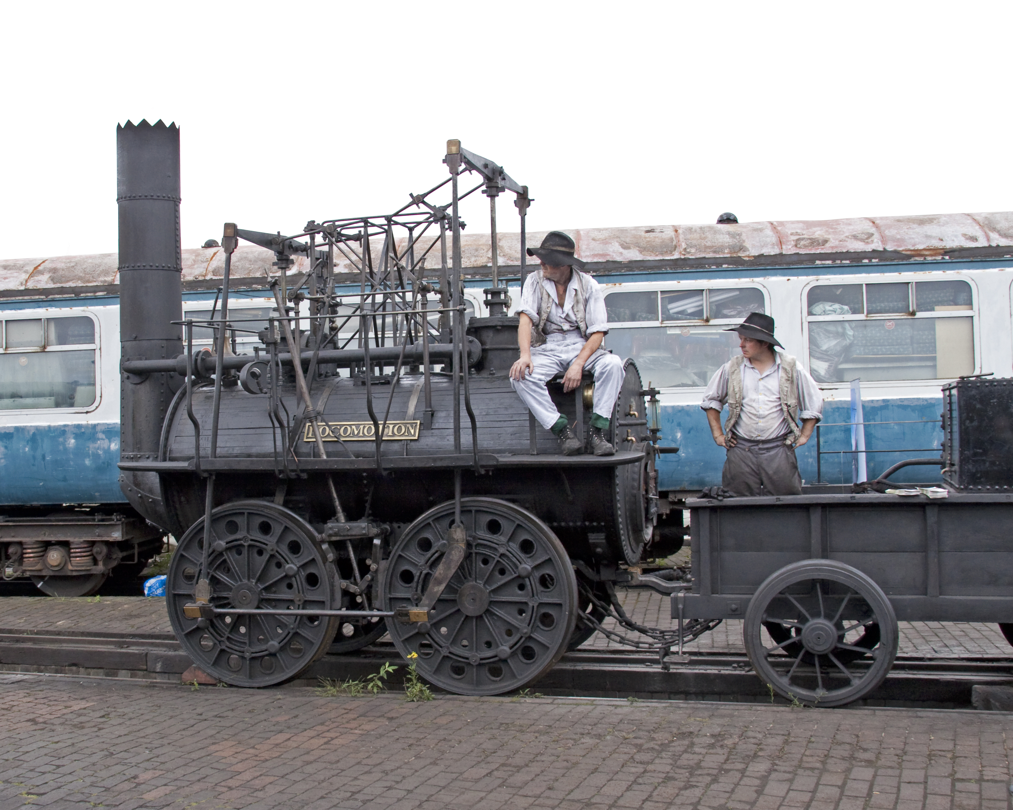 Locomotion 2